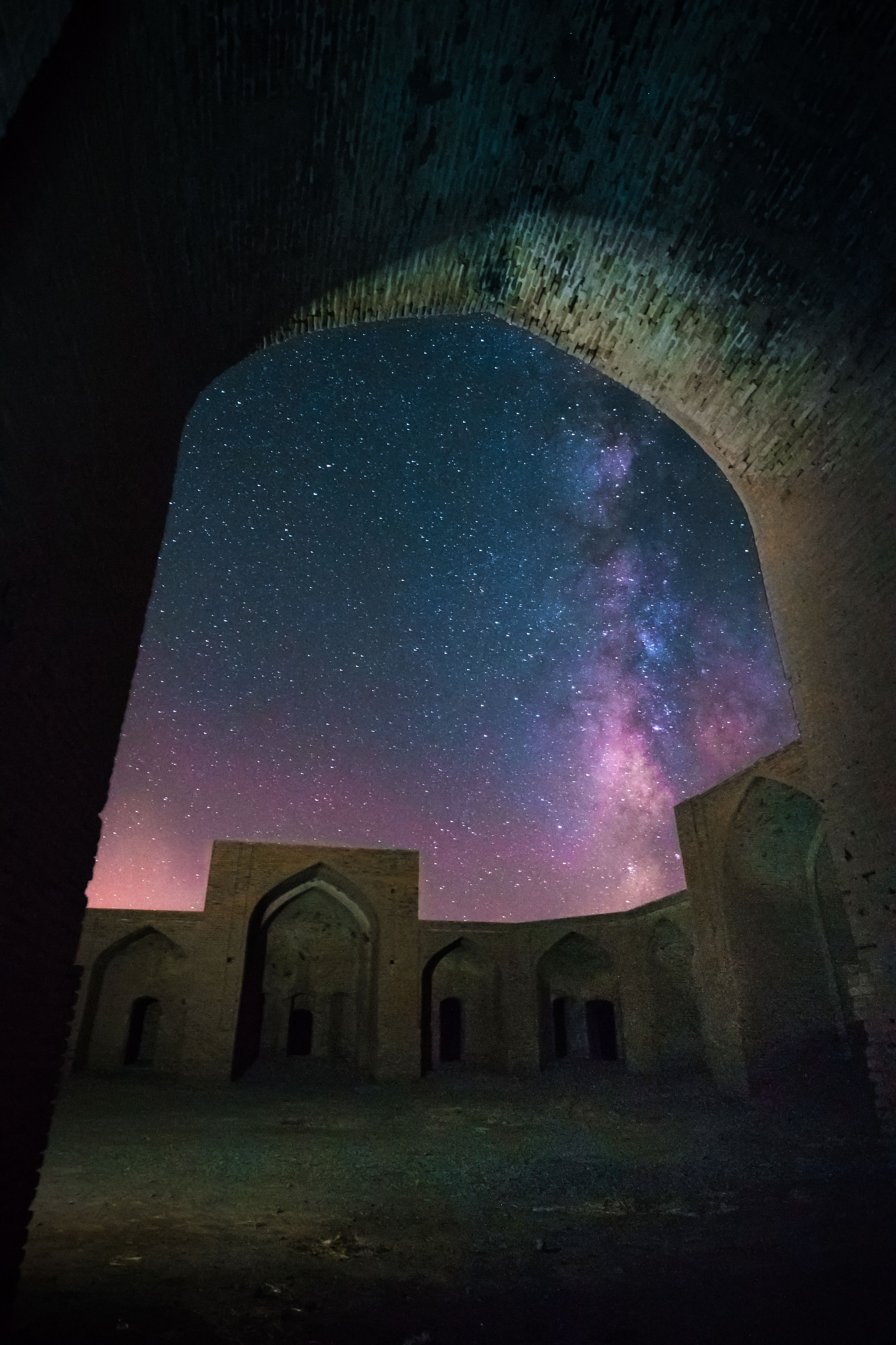 مجموعه عباس آباد با توجه به فاصله داشتن مناسب از شهر های تایباد و تربت جام مکانی تاریک محسوب شده و بسیار مناسب برای عکاسی و رصد ستارگان توسط منجمین آماتور و حرفه ای محسوب می شود تور های نجوم و رصد ستارگان به صورت فصلی در این کاروان سرا برگزار می شود.